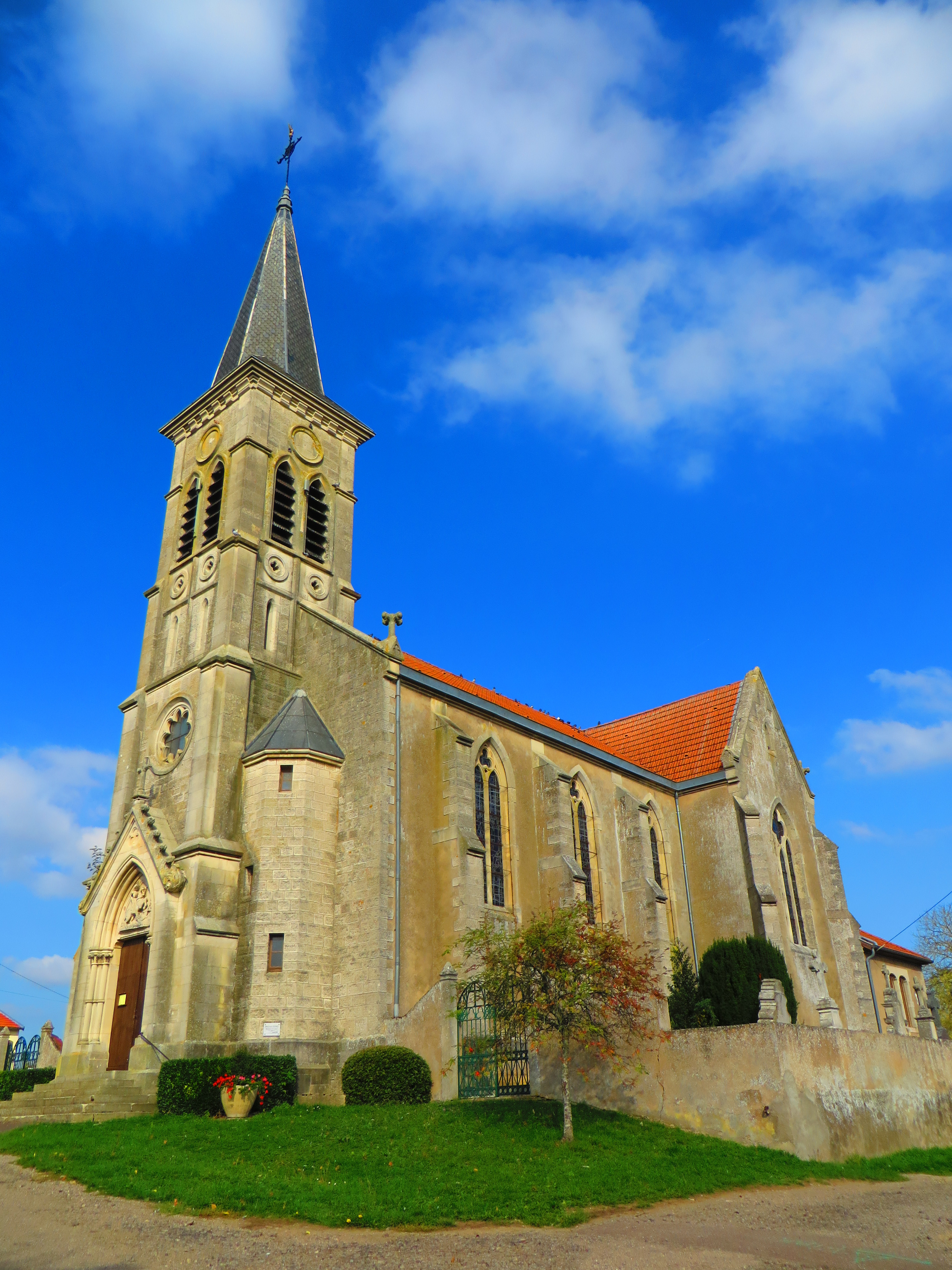 Manhoué l'église Saint-Georges